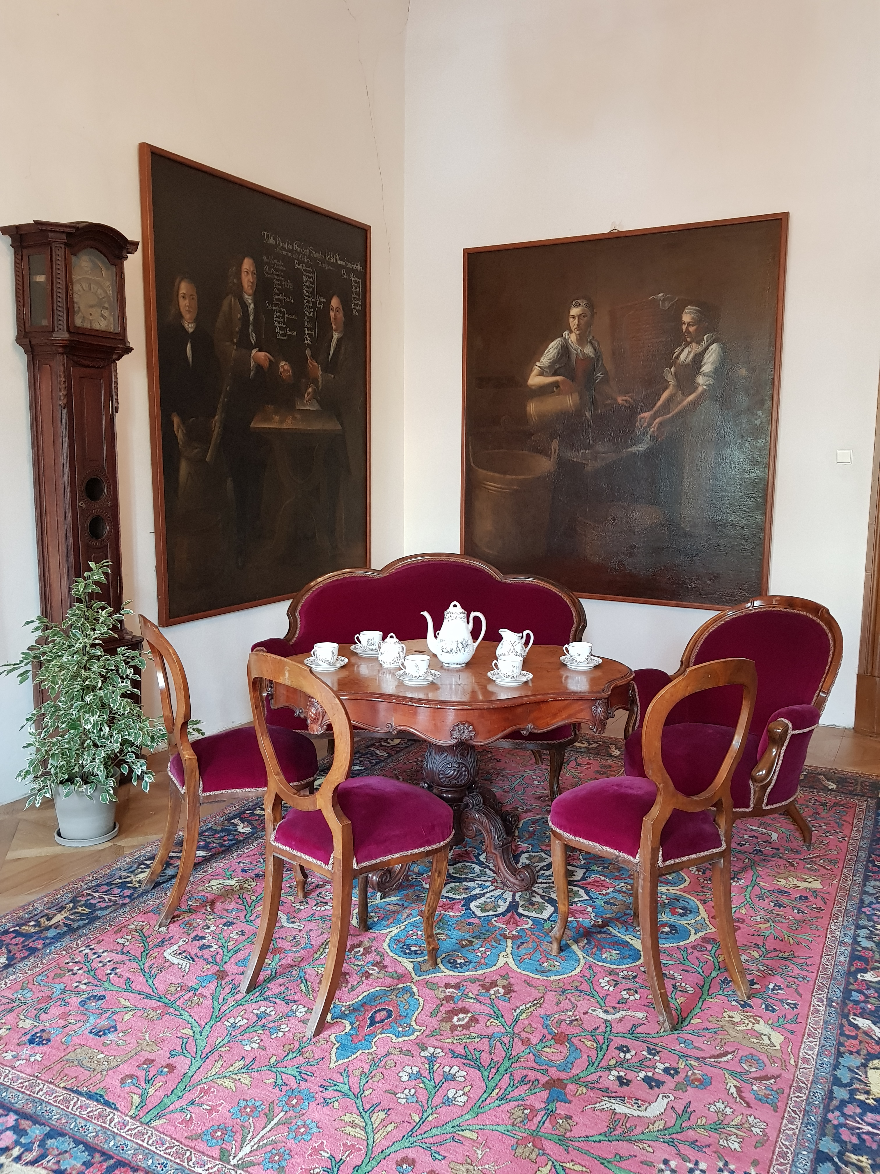 Interiéry zámku Manětín